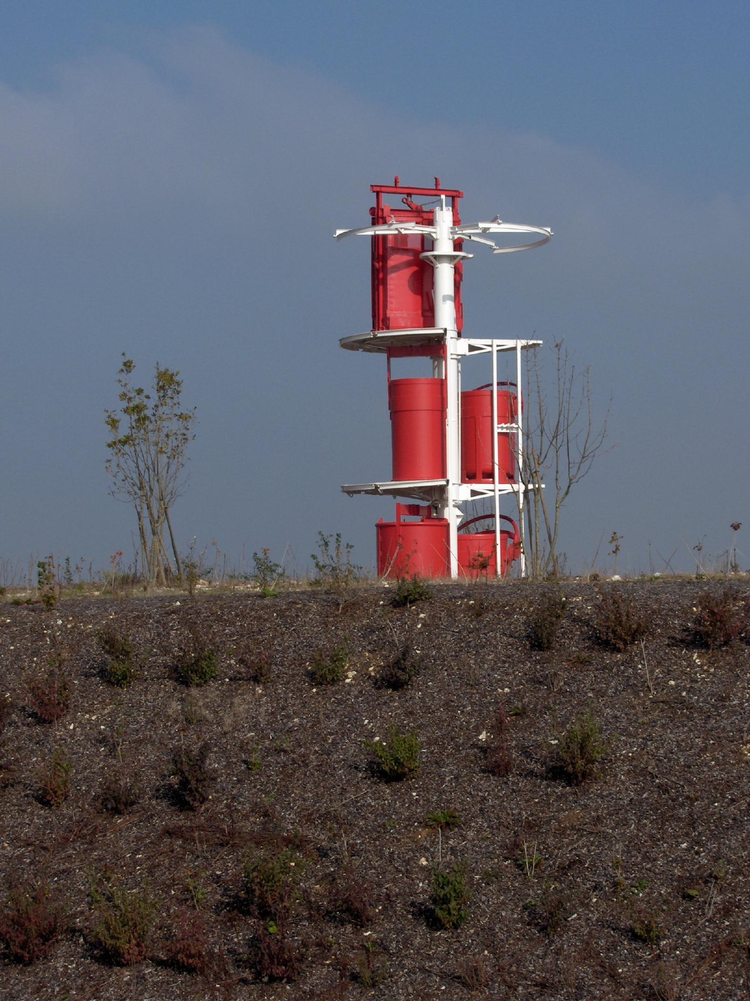 Cuffats (seaux rouges) permettant l'évacuation des déblais lors du creusement au Laboratoire de recherche souterrain de Meuse/Haute-Marne à Bure